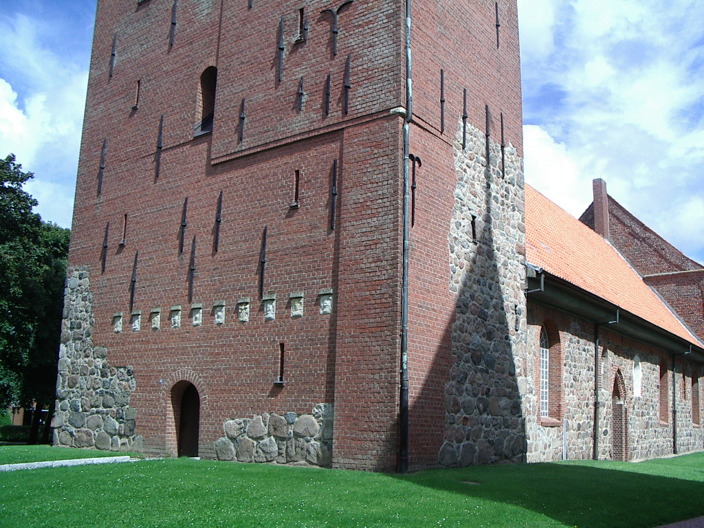 St. Nicolai-Kirche, Altenbruch Foto von Benutzer:Geoz 2005